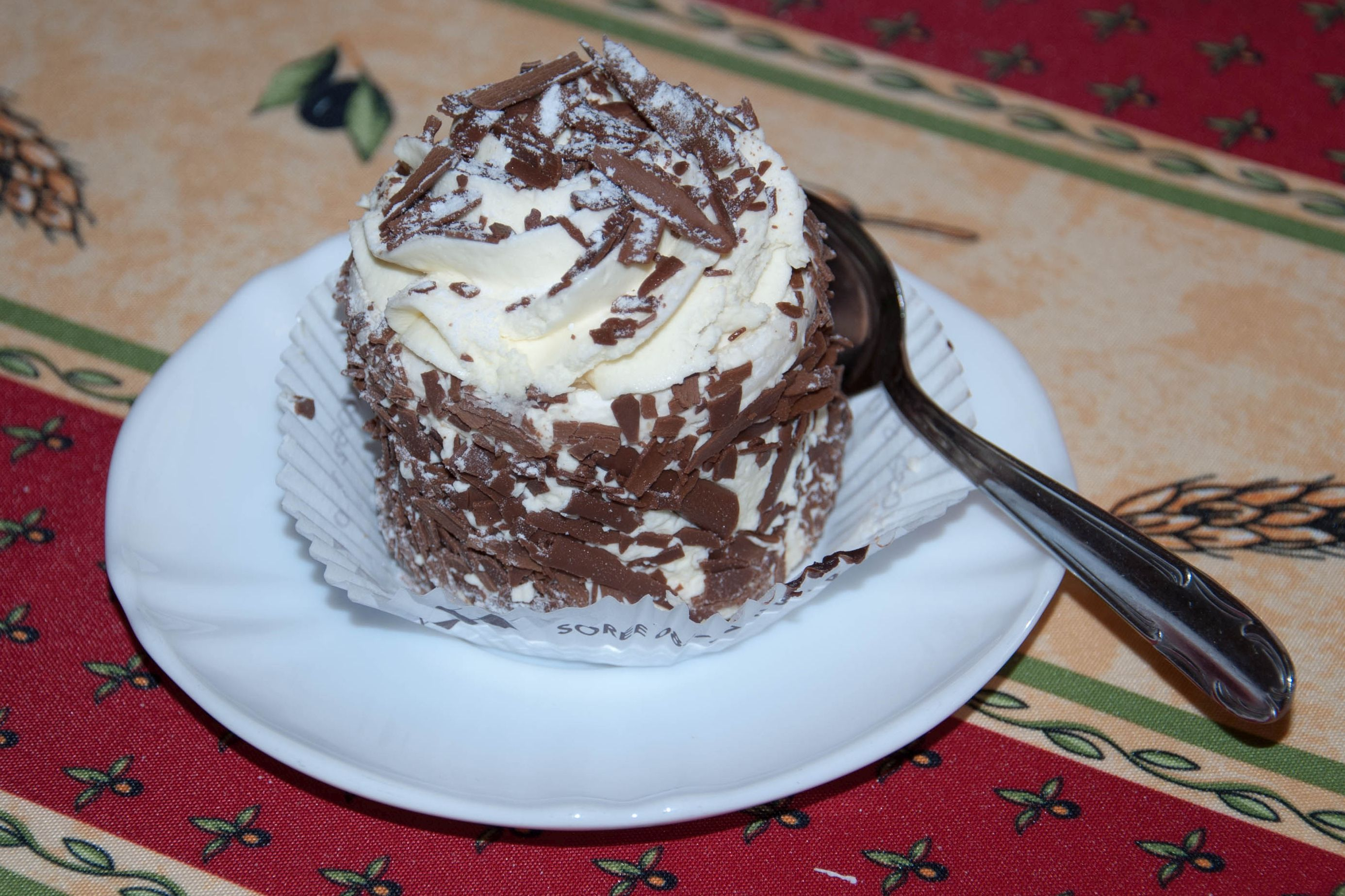 Gâteau originaire de Belgique, composé de meringue, chantilly et copeaux de chocolat.